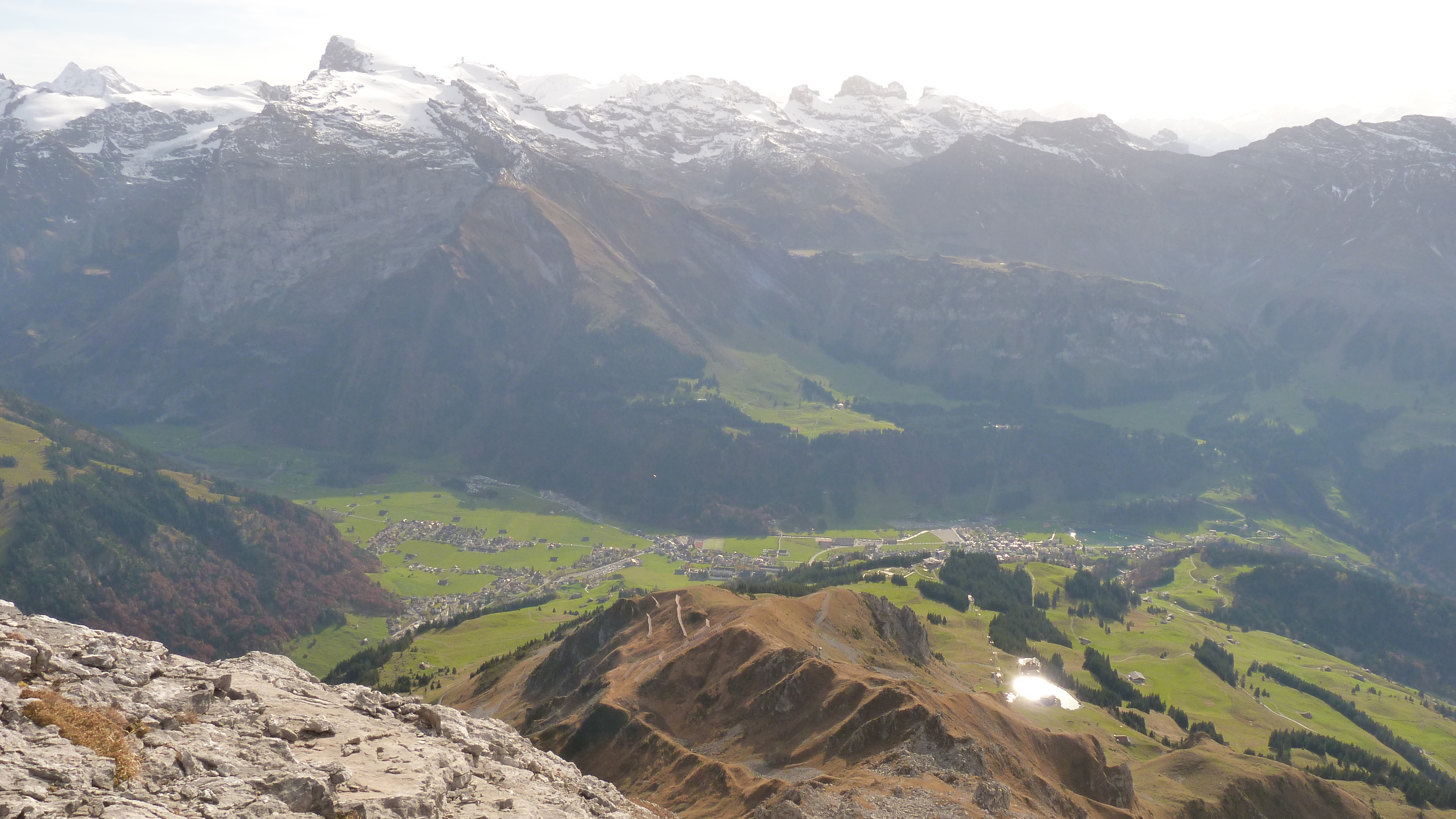 Aussicht vom Rigidalstock in Richtung Süden